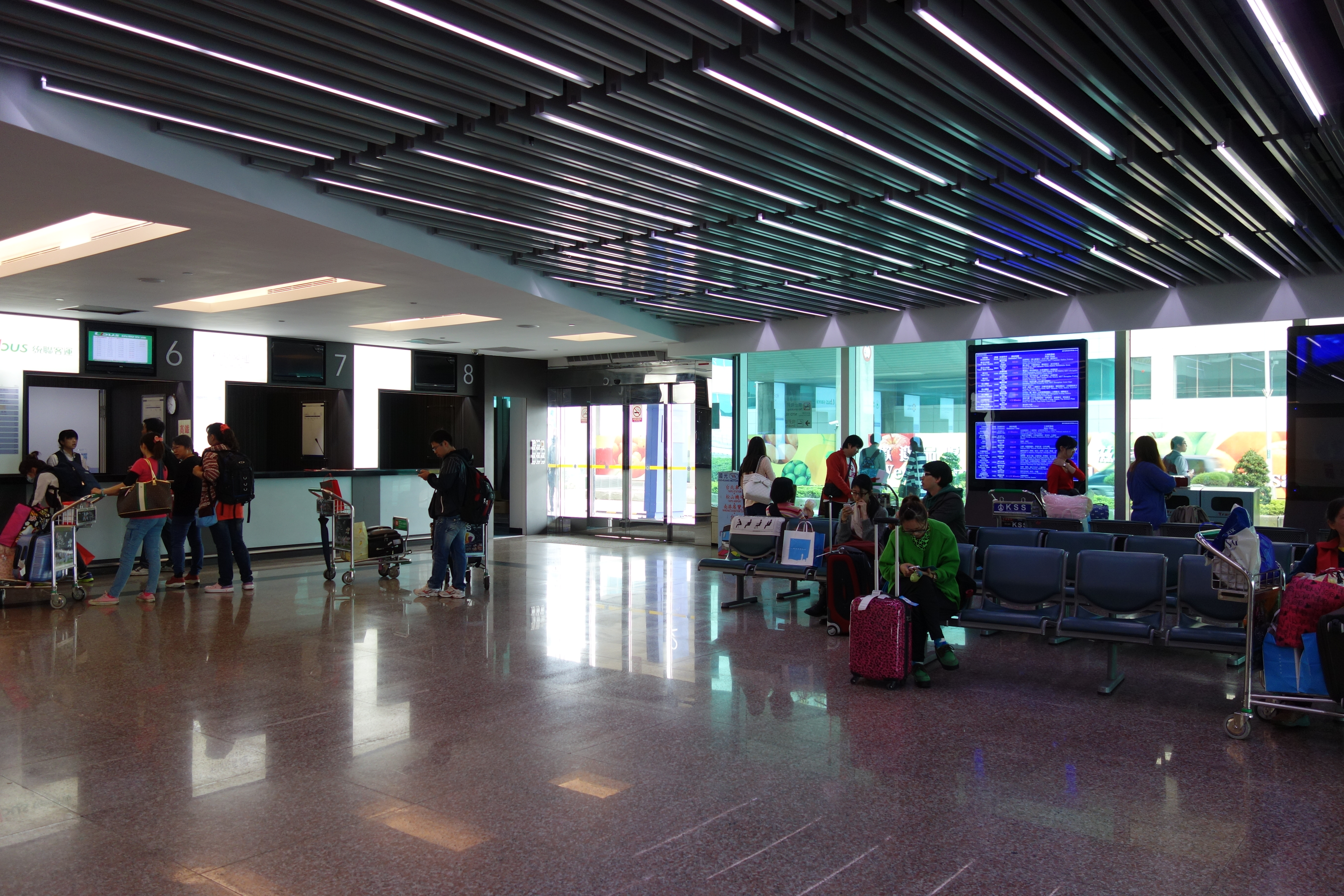 台湾桃園国際空港 バスターミナル （第2ターミナル・路線バス用）